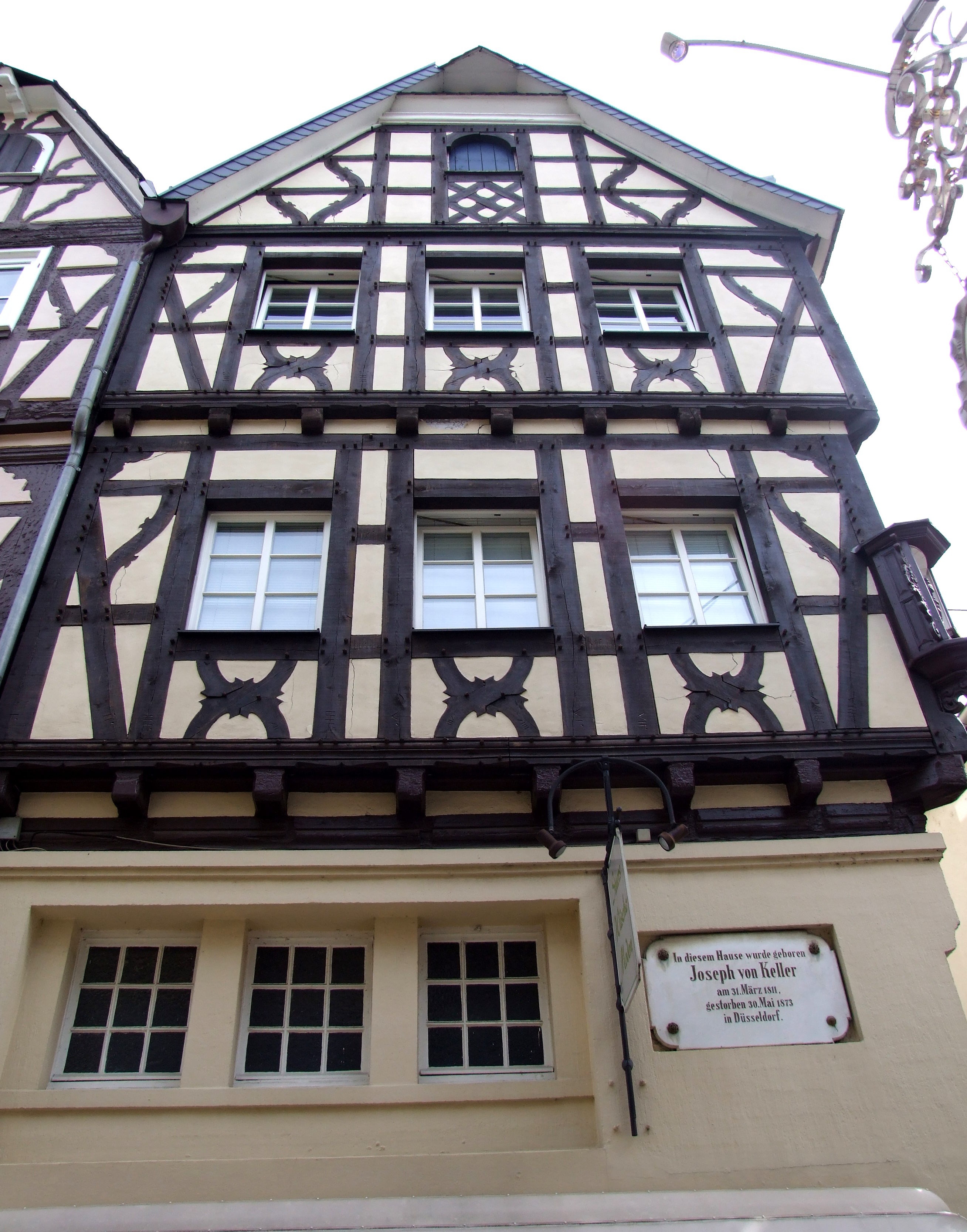 Geburtshaus von Joseph von Keller in Linz am Rhein, Rheinstraße 10/Von Kellerstraße